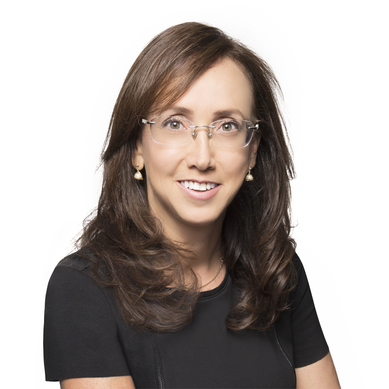 קרין מאיר רובינשטין